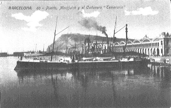 Cañonero Torpedero "Temerario" en el puerto de Barcelona